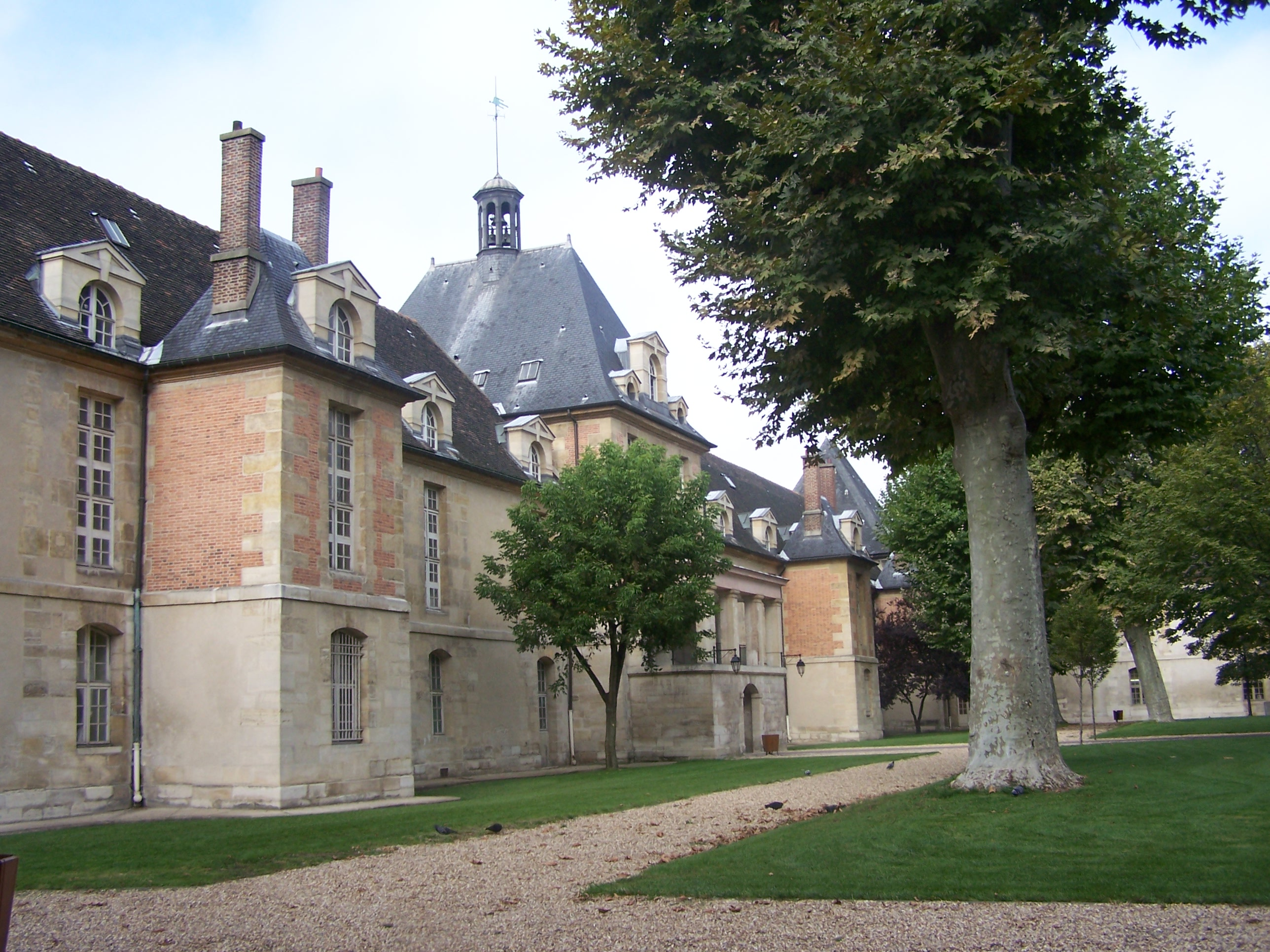 Hôpital Saint-Louis, vue intérieure côté sud (Paris, France)